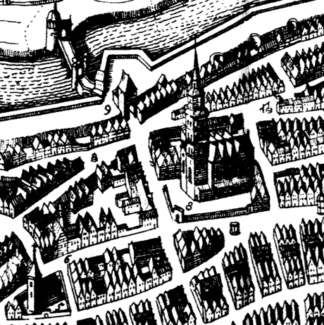 cutout church Ansgarii from Bremen-1641-Merian.jpg